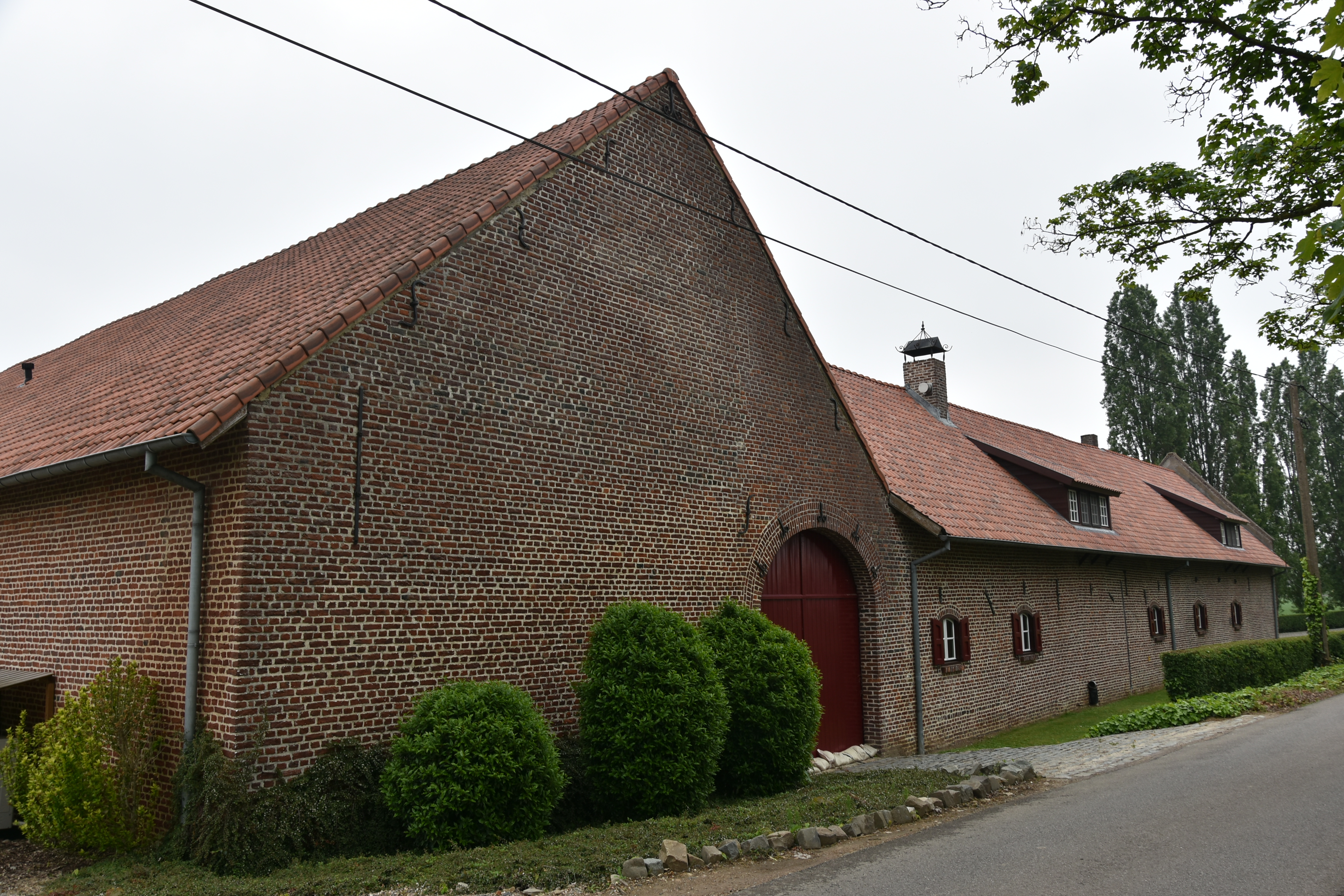 Hoeve Monnikhof Boorsem (1150) 18-05-2019 10-59-50